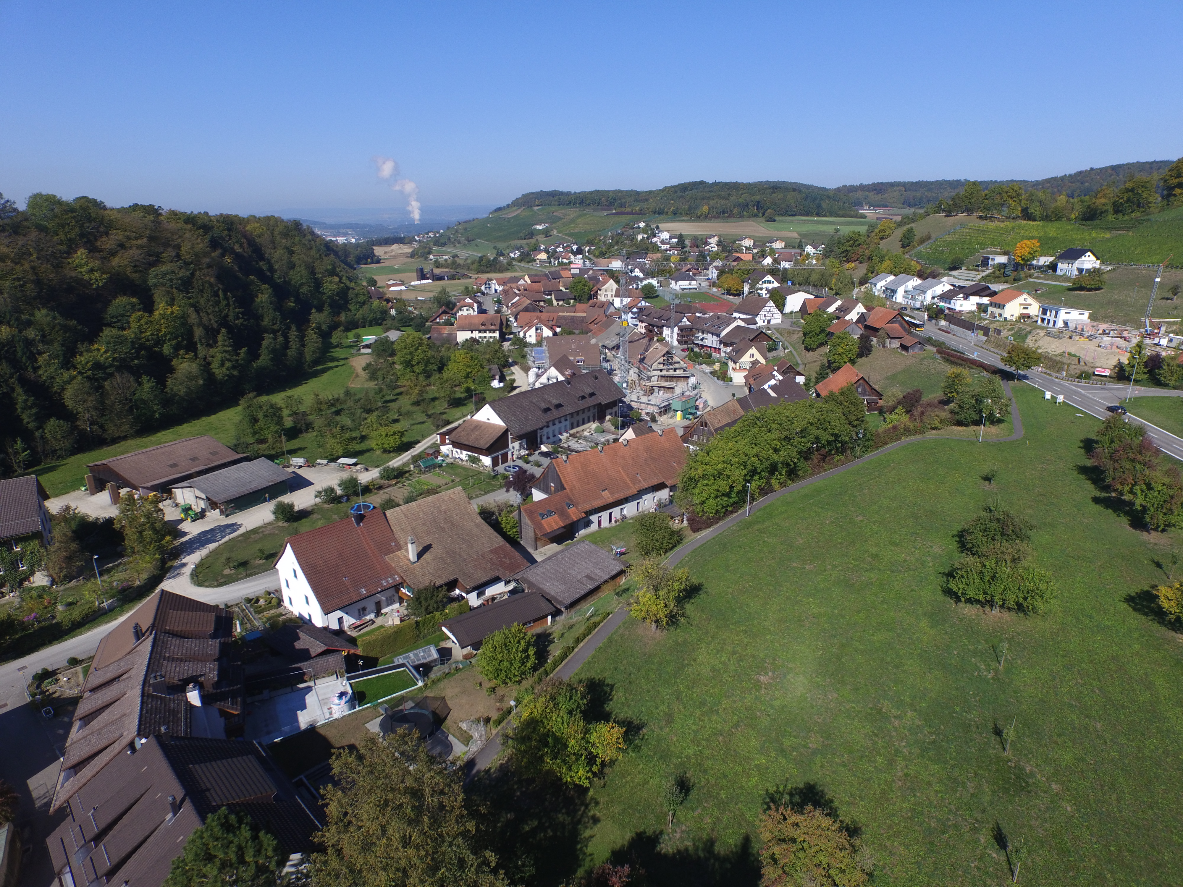 Blick auf Tegerfelden